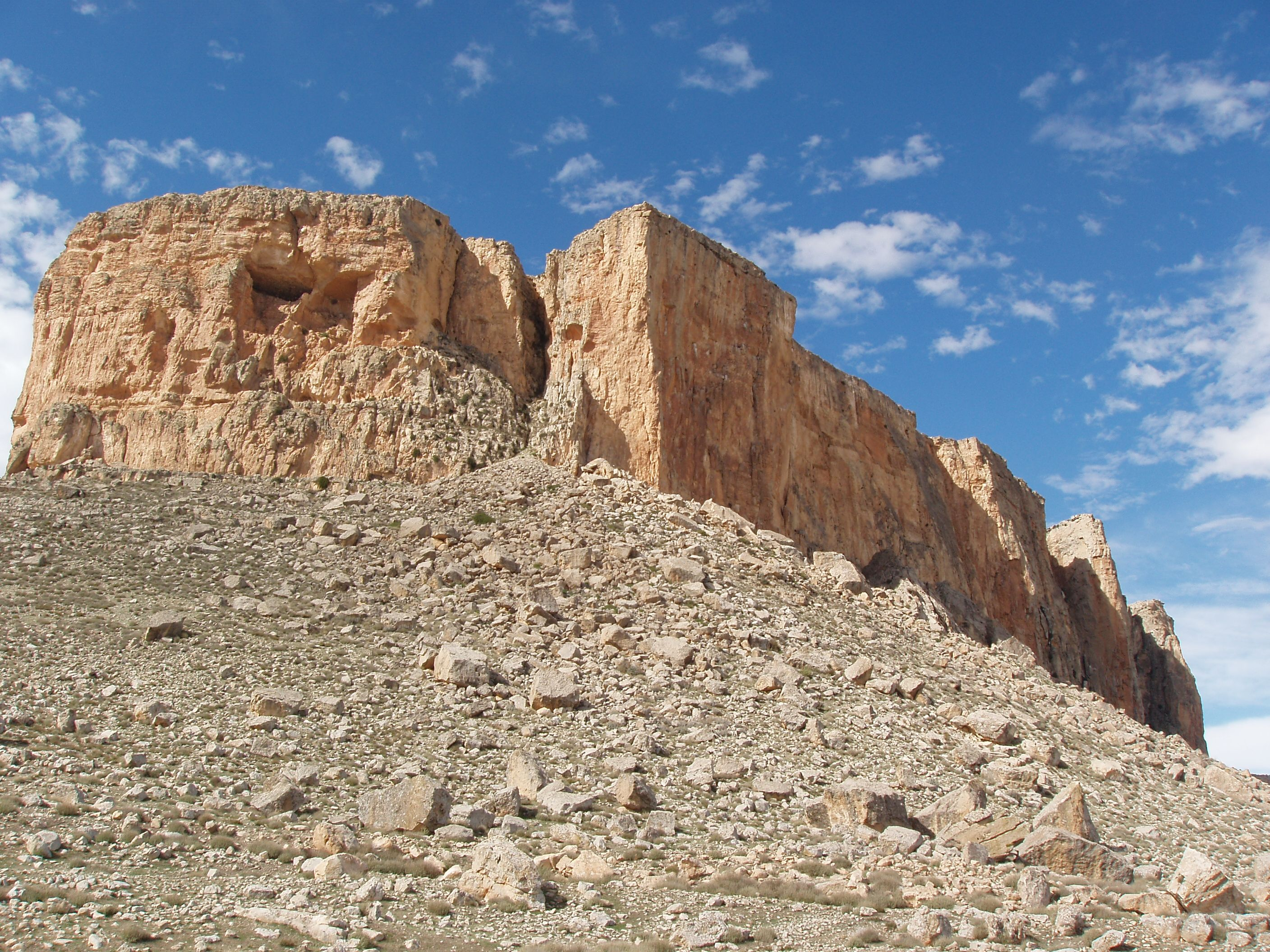 Table de Jugurtha située près de Kalaat Senan en Tunisie